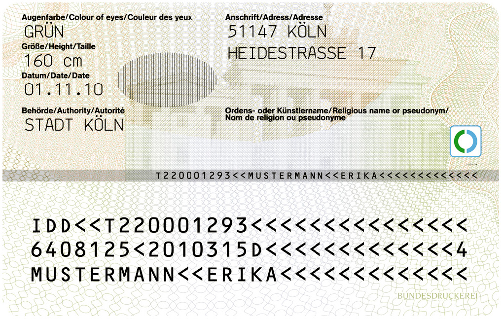 Muster des deutschen Personalausweises, Rückseite